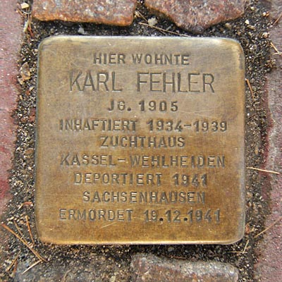 Stolpersteine Tevestrasse 43 für Fehler, Karl für Commons.wikimedia freigegeben von der Initiative Stolpersteine Frankfurt am Main